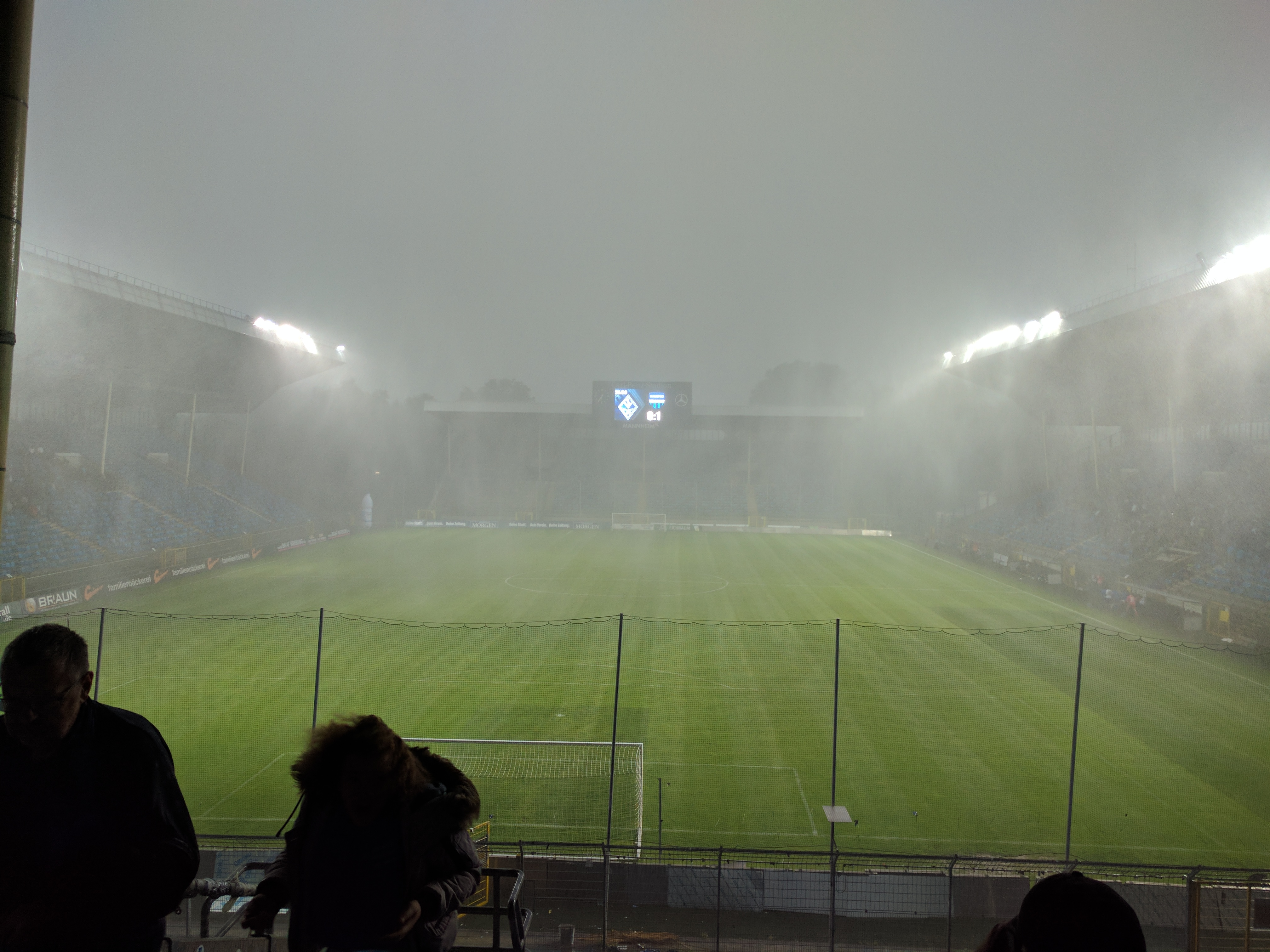 Spielunterbrechung wegen Gewitters beim Abschiedsspiel von Hanno Balitsch im Carl-Benz-Stadion Mannheim